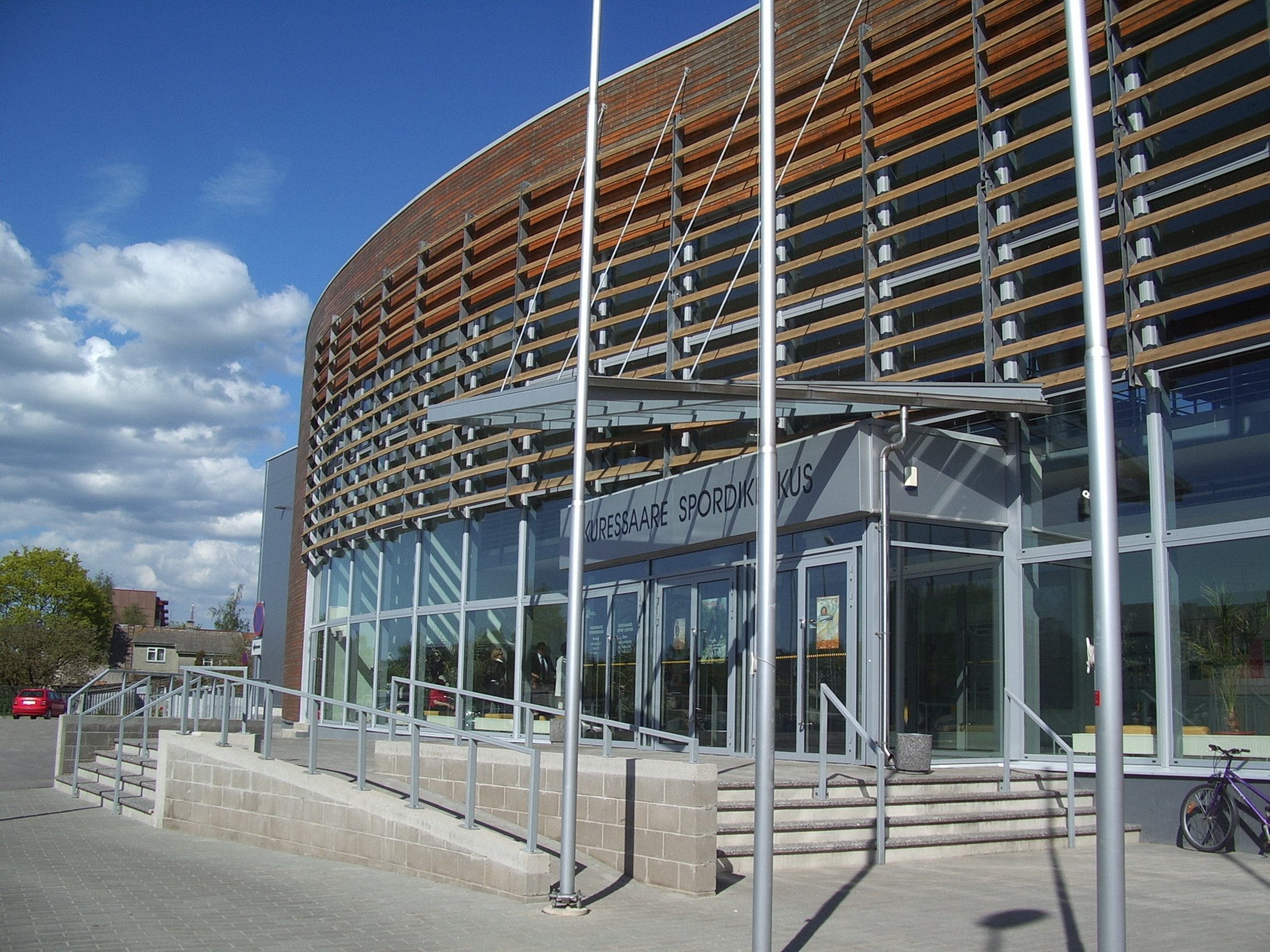 2005. aastal avatud Kuressaare spordikeskus